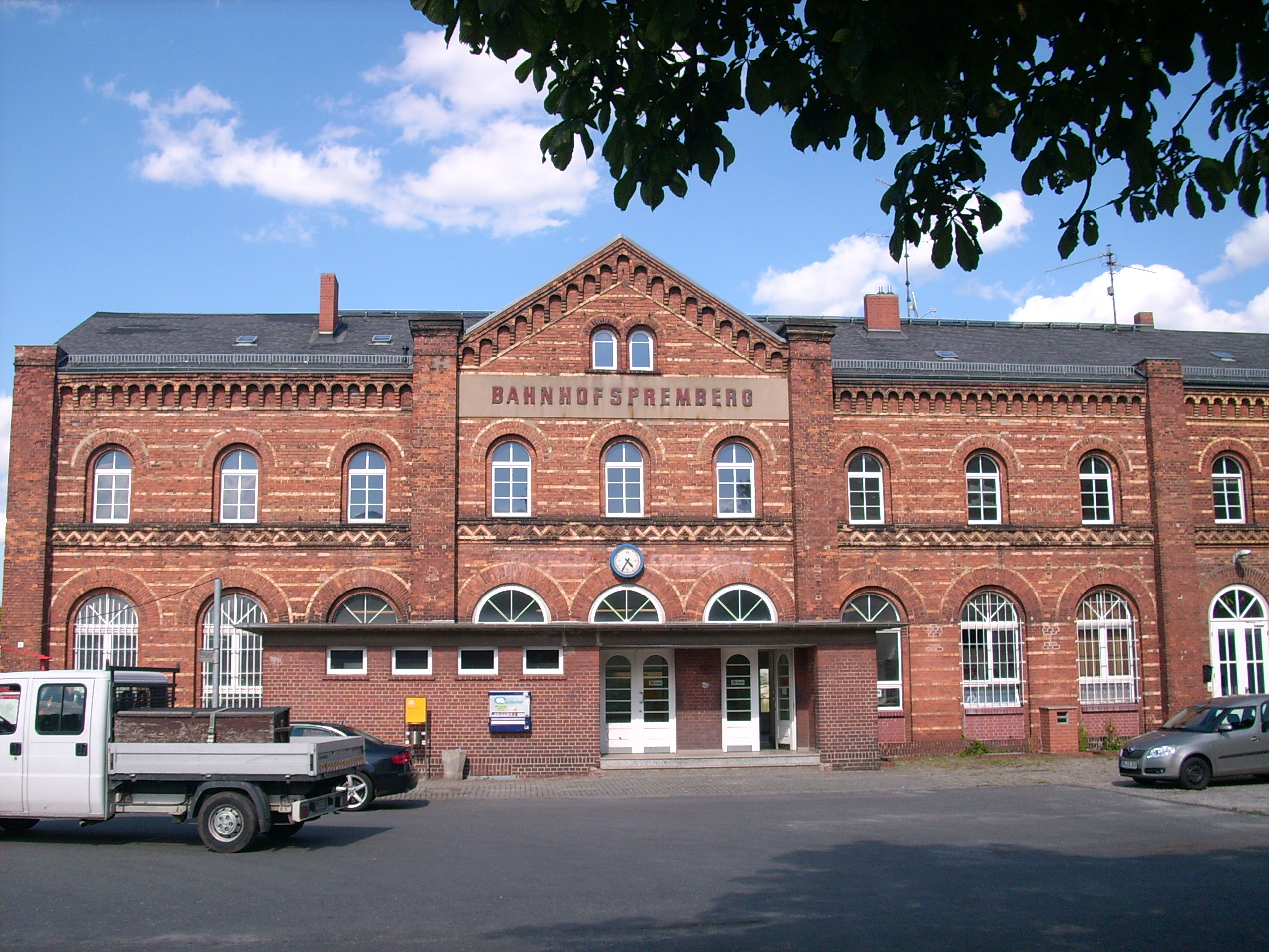 Bahnhof, Grazer Straße 20 in Spremberg